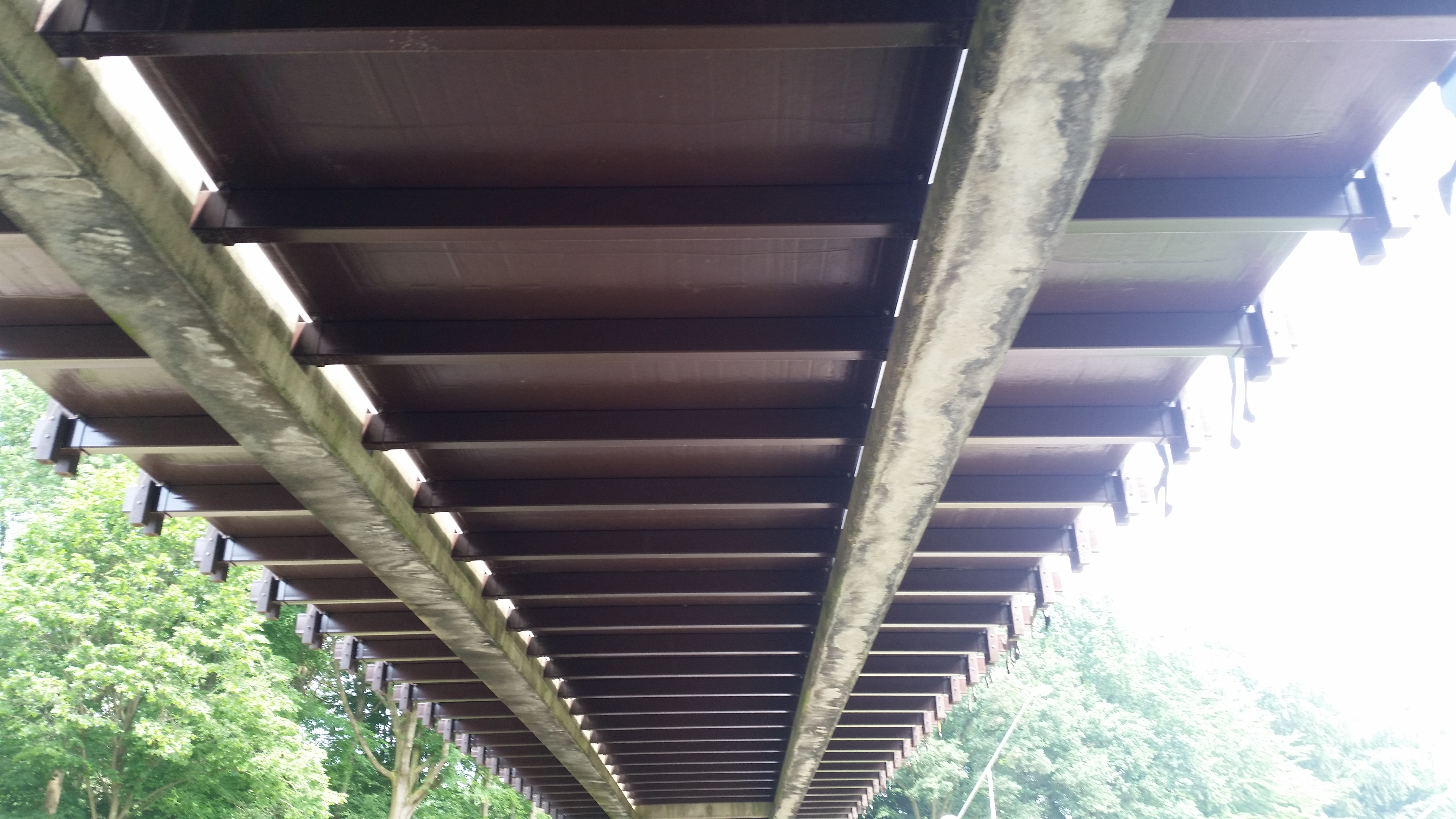 Brug 678 in het Sloterpark, over de President Allendelaan, Amsterdam, onderkant van de overspanning